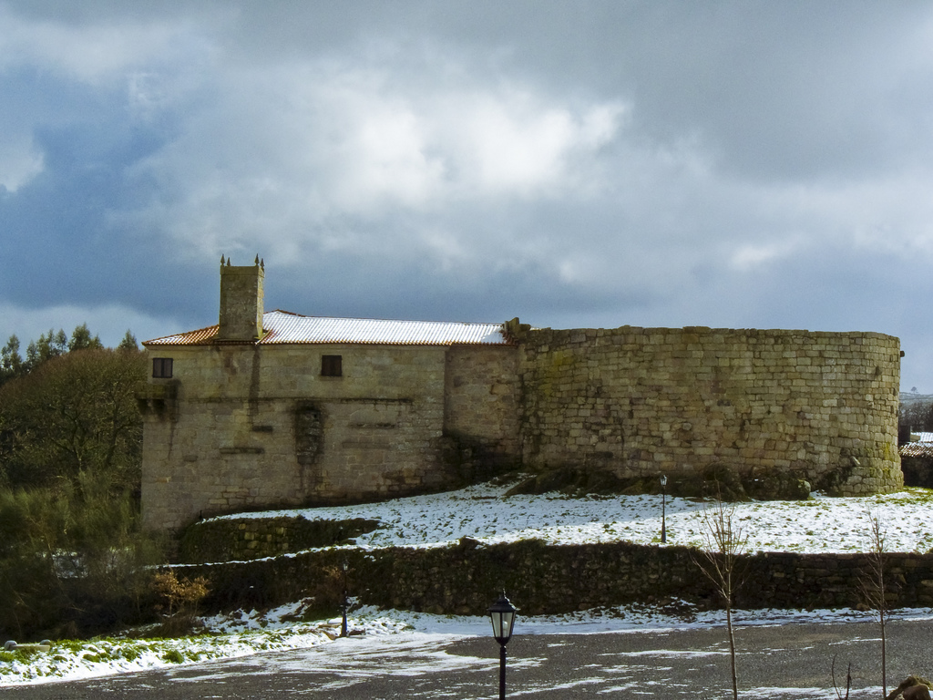 Castelo e pazo de Amarante - Antas de Ulla